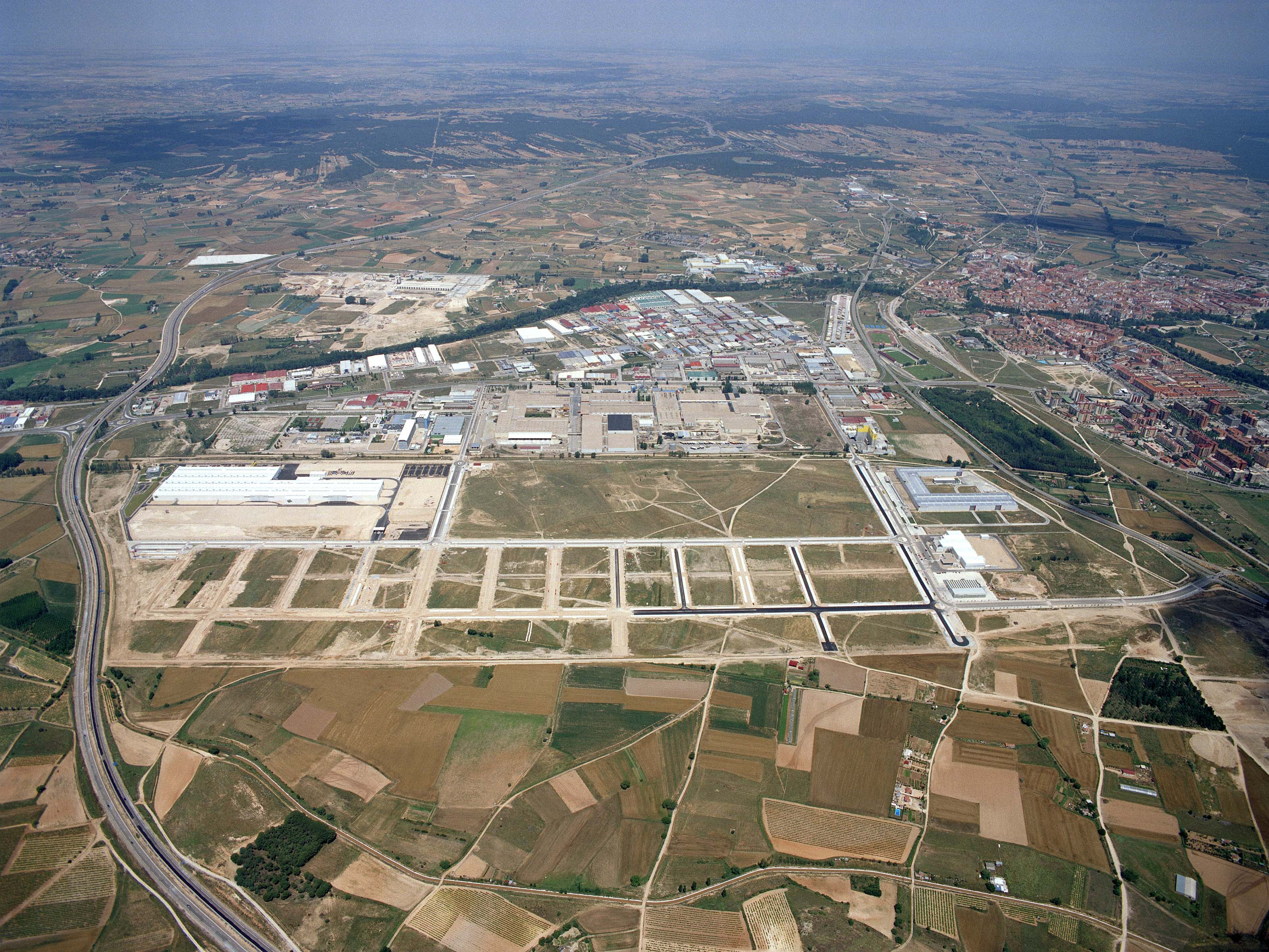 Foto Aérea de Aranda de Duero (Burgos - España). En primer Plano los polígonos industriales: Prado Marina y Allendeduero, donde se distinguen las instalaciones de TecnoAranda, GlaxoSmithkline y Michelin. A la Izquierda se observa la A1 - E5, a la derecha la N1. Tambien se obserban al fondo, las instalaciones del Grupo Gerardo de la Calle y del Grupo Leche Pascual en la carretera C619 (Aranda - Palencia). A la derecha se observan los barrios: Polígono, Allendeduero, Centro histórico y Santa Catalina.